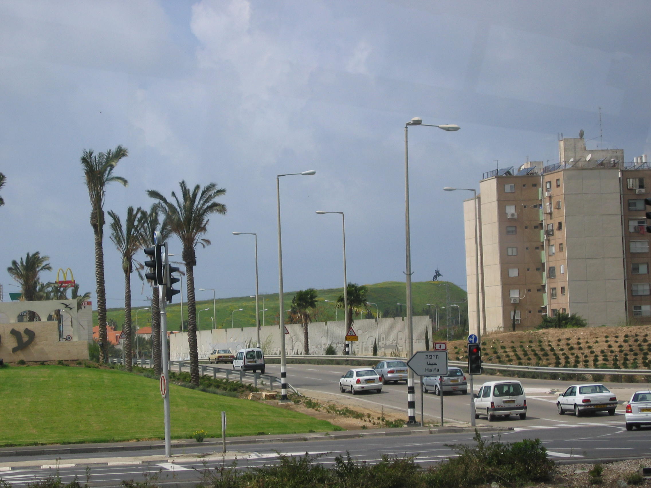 כביש 4 (בתחתית התמונה) בצומת עכו מזרח בעכו. ברקע גבעת נפוליאון. תל עכו מצומת עכו.